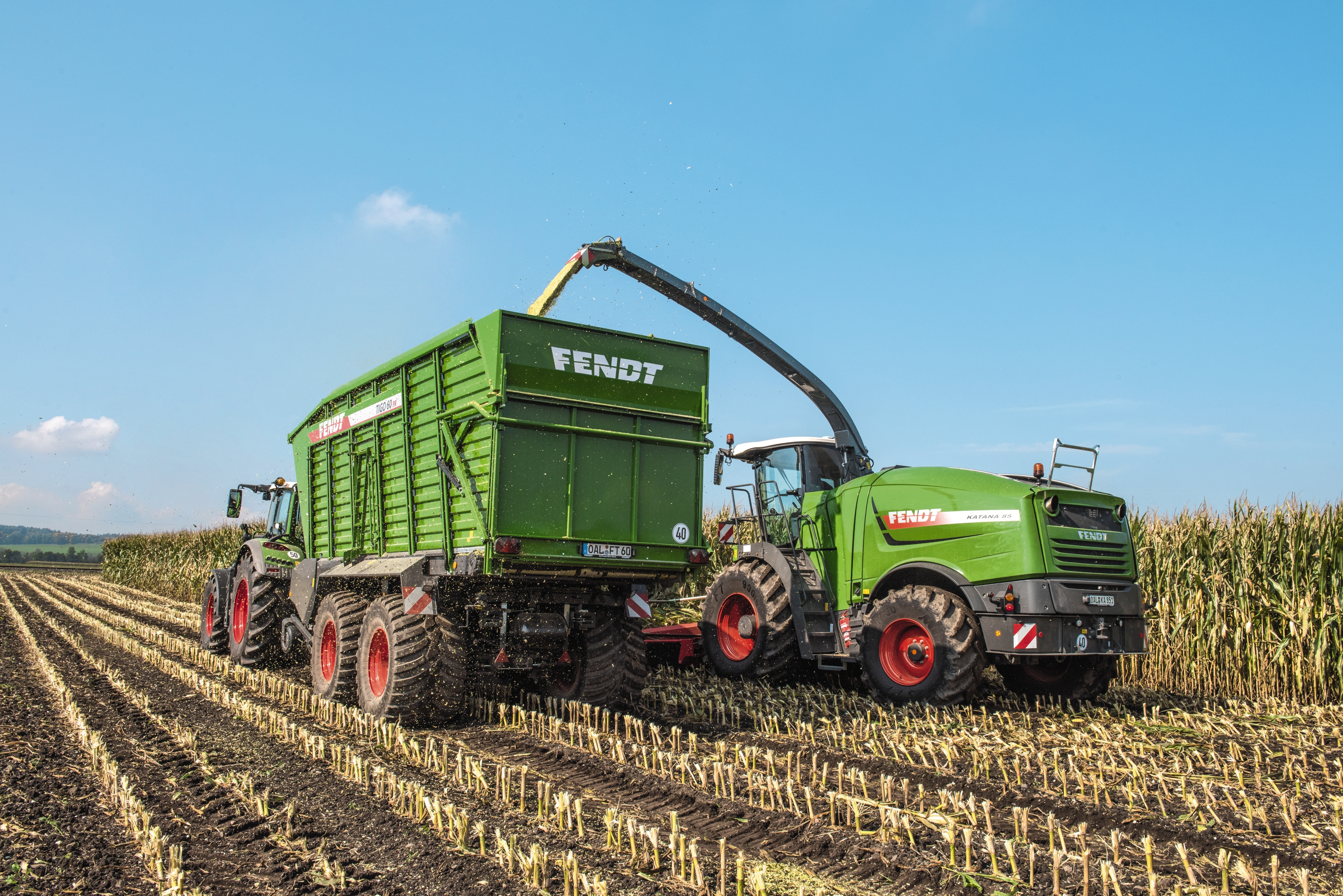 Fendt Katana 85